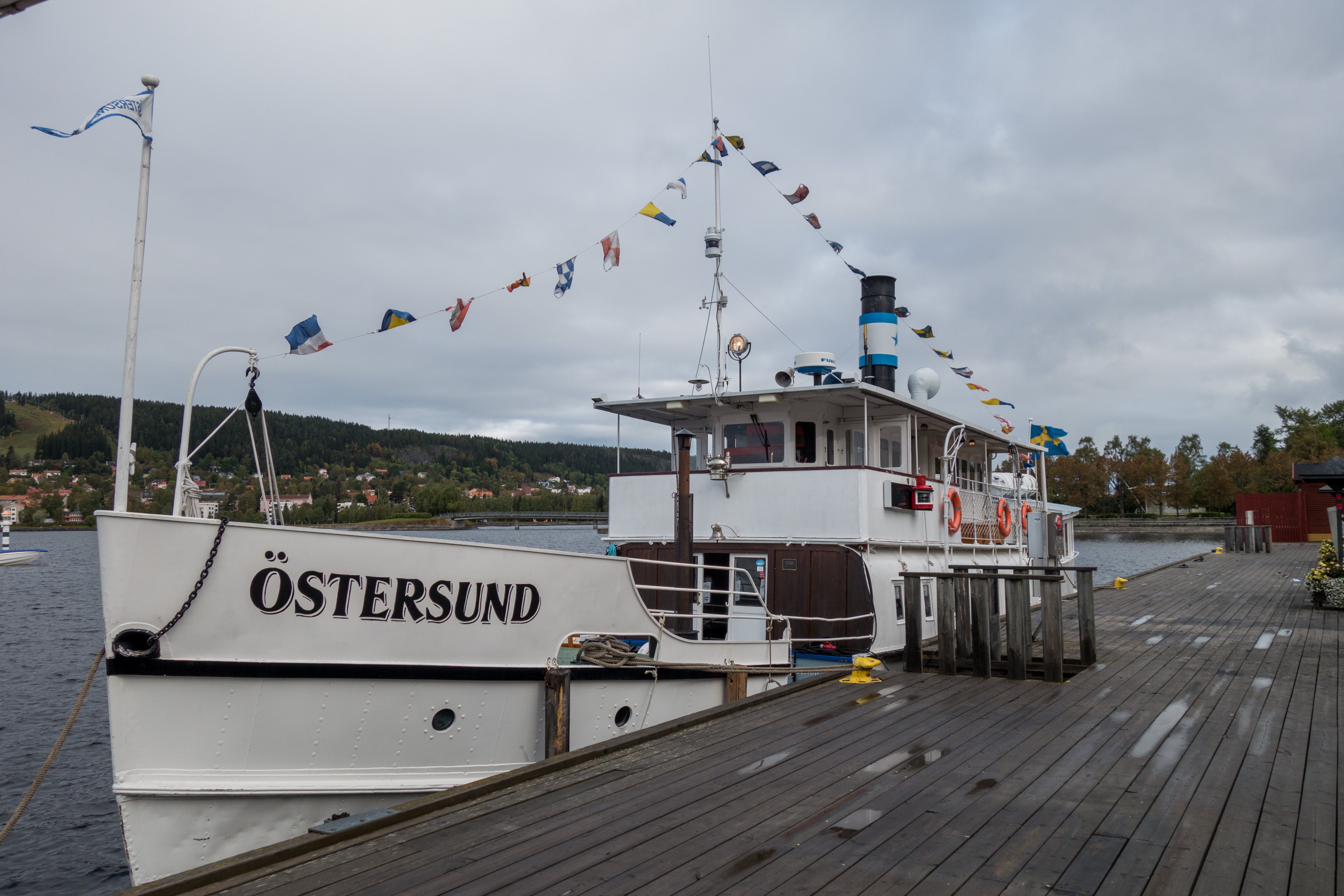 S/S Östersund (1874) i hamn i Badhusparken, Östersund This is an image of a protected Swedish ship, with call sign SHNM .